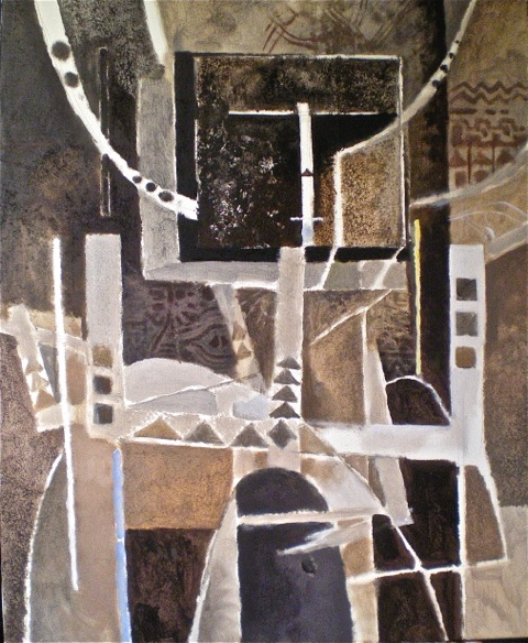 Le chemin du pollen